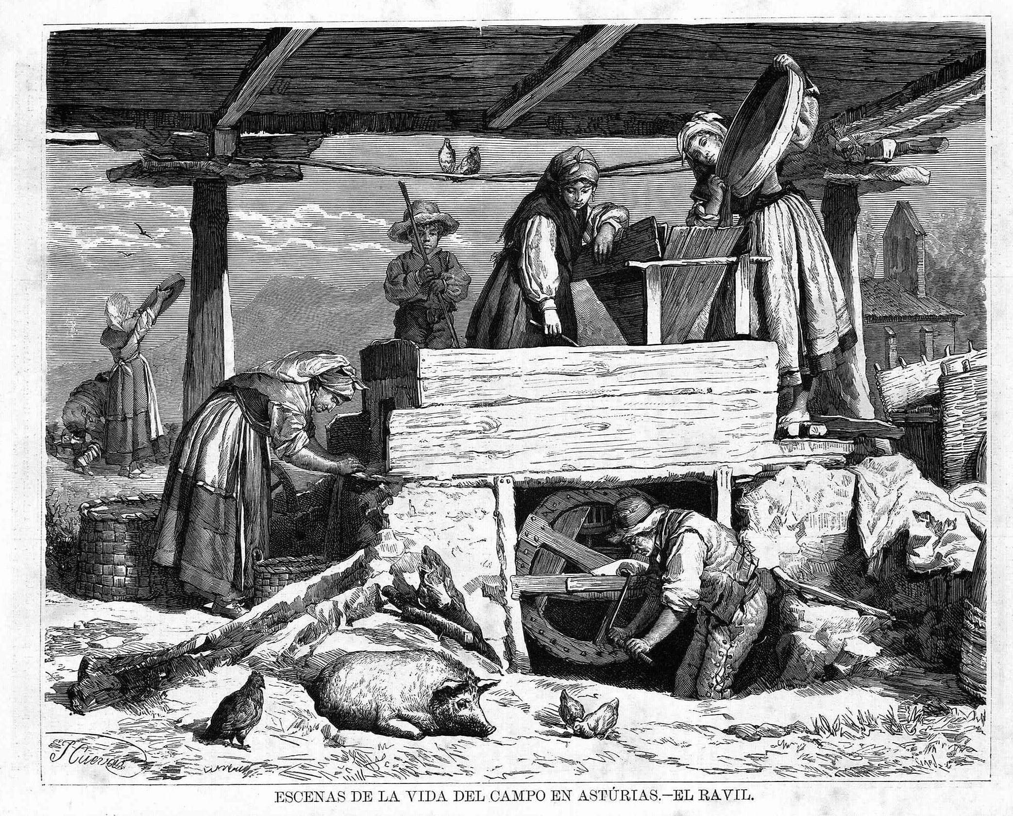 Escenas de la vida del campo en Asturias: el ravil, en la revista española La Ilustración de Galicia y Asturias.